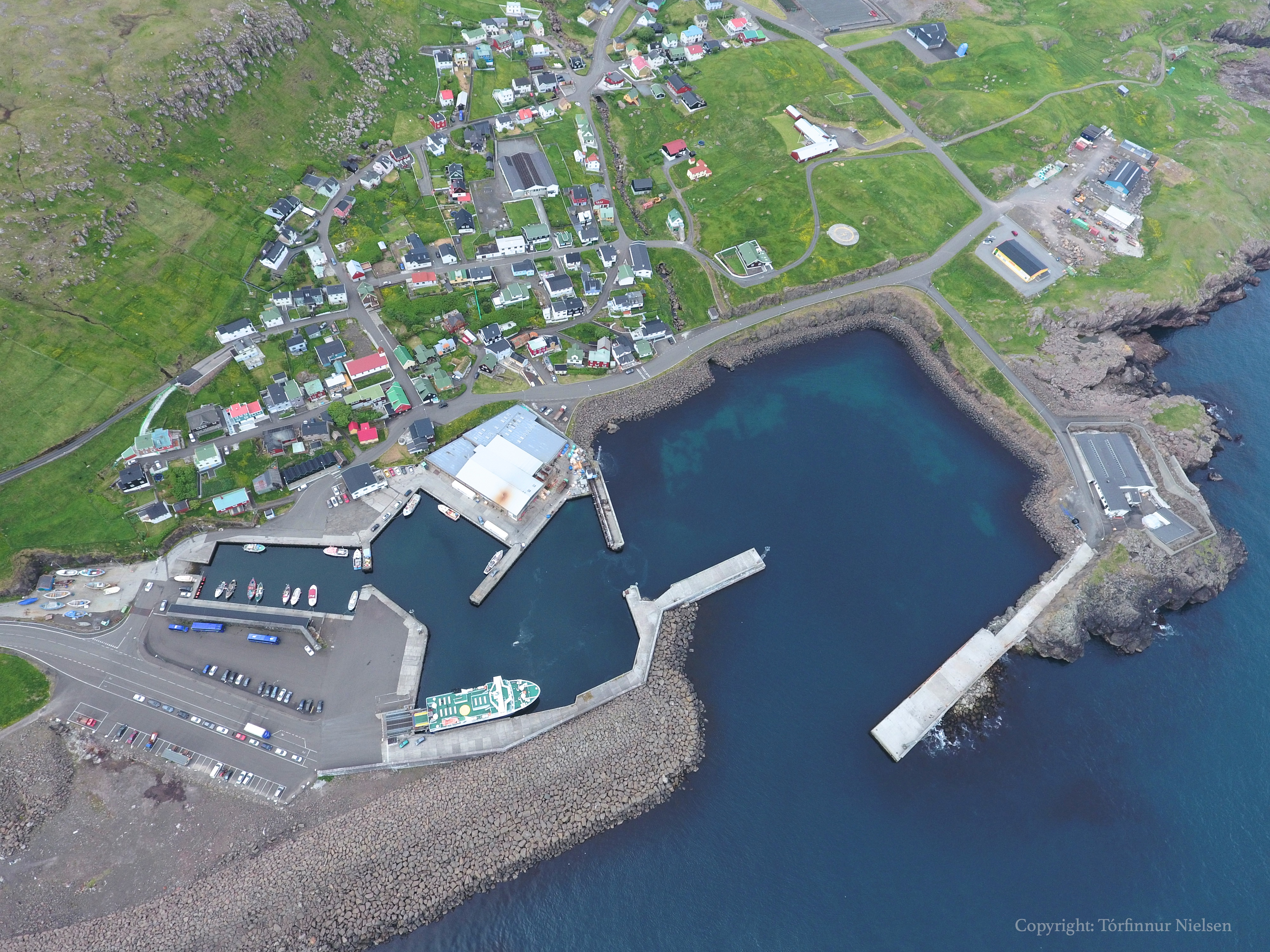 Billede af Skopun havn